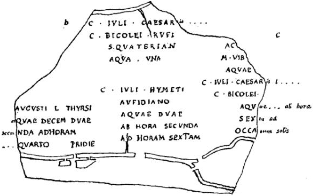 Fragment de plan découvert à Rome et attribué par Theodor Mommsen à la distribution de l’eau par l'aqua Crabra, à destination de Tusculum.